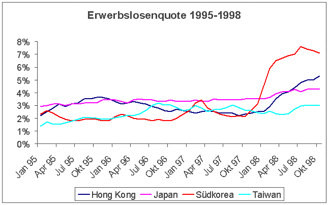 Unemployment rate 1995-1998